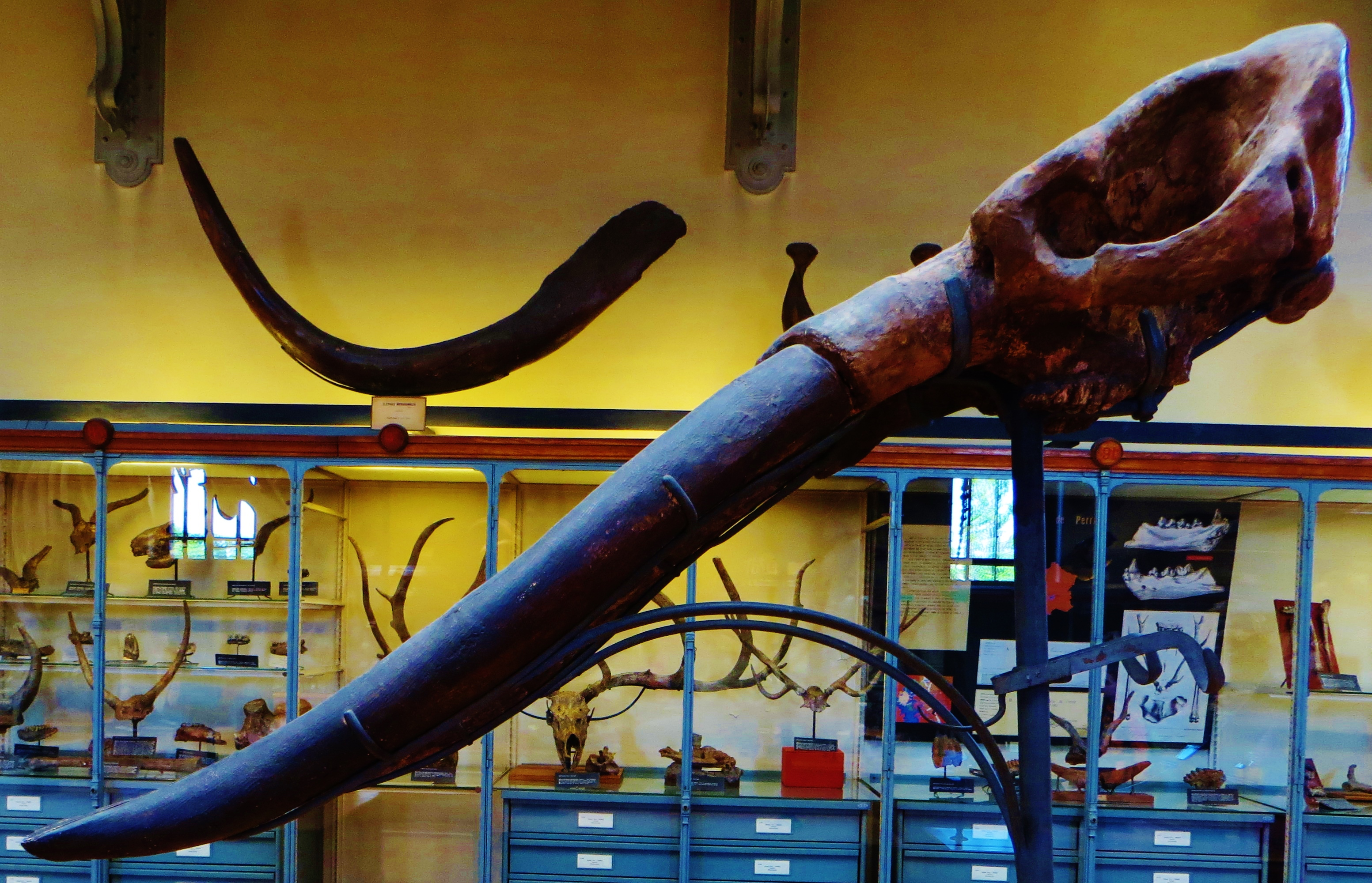 Fossil of Cuvieronius, an extinct mammal - Took the photo at Musee d'Histoire Naturelle, Paris